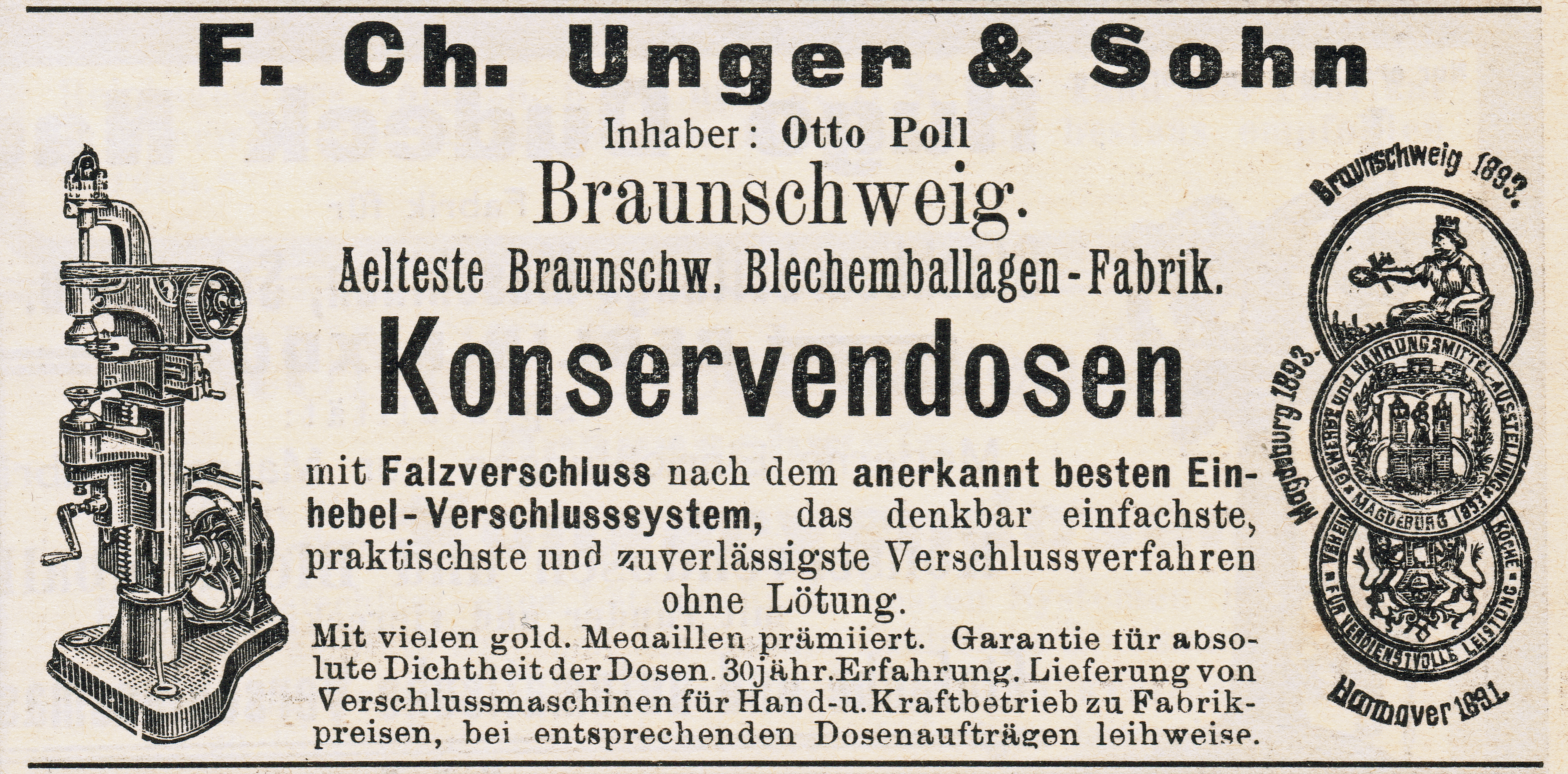 Werbeanzeige der Firma F. Ch. Unger & Sohn (Konserven-Zeitung, Jahrgang 1907.)